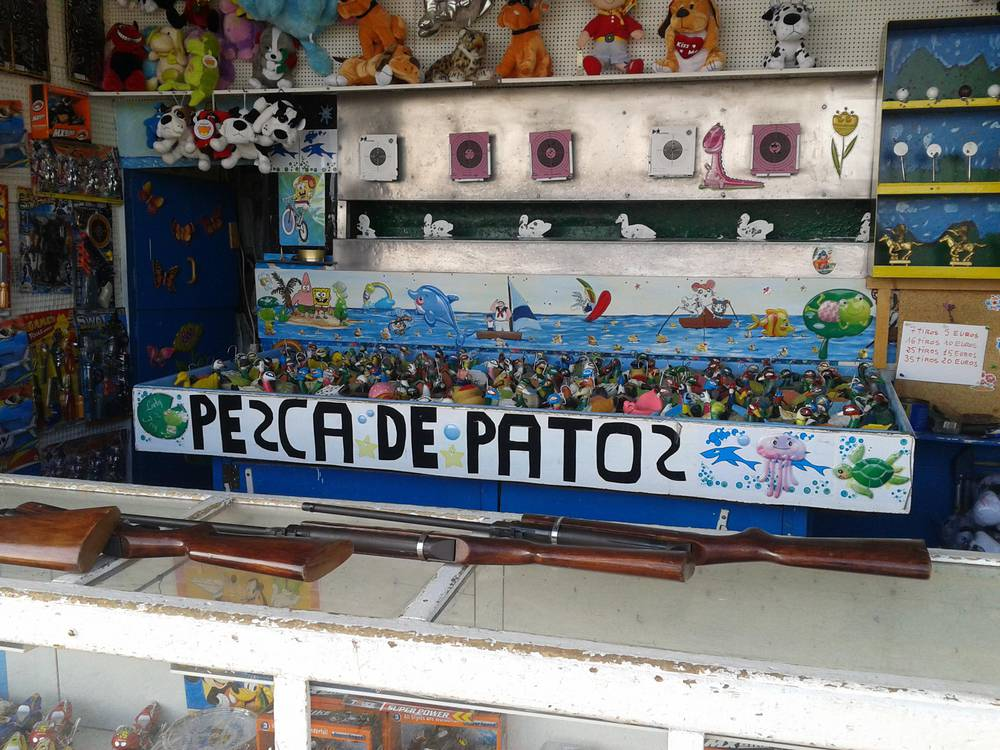 Igeldoko jolas-parkean, ahateen jokoa